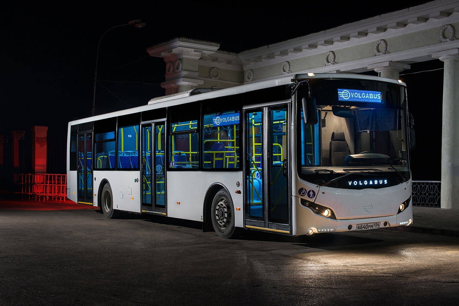 Низкопольные автобусы Волжского завода для олимпийских игр в Сочи.